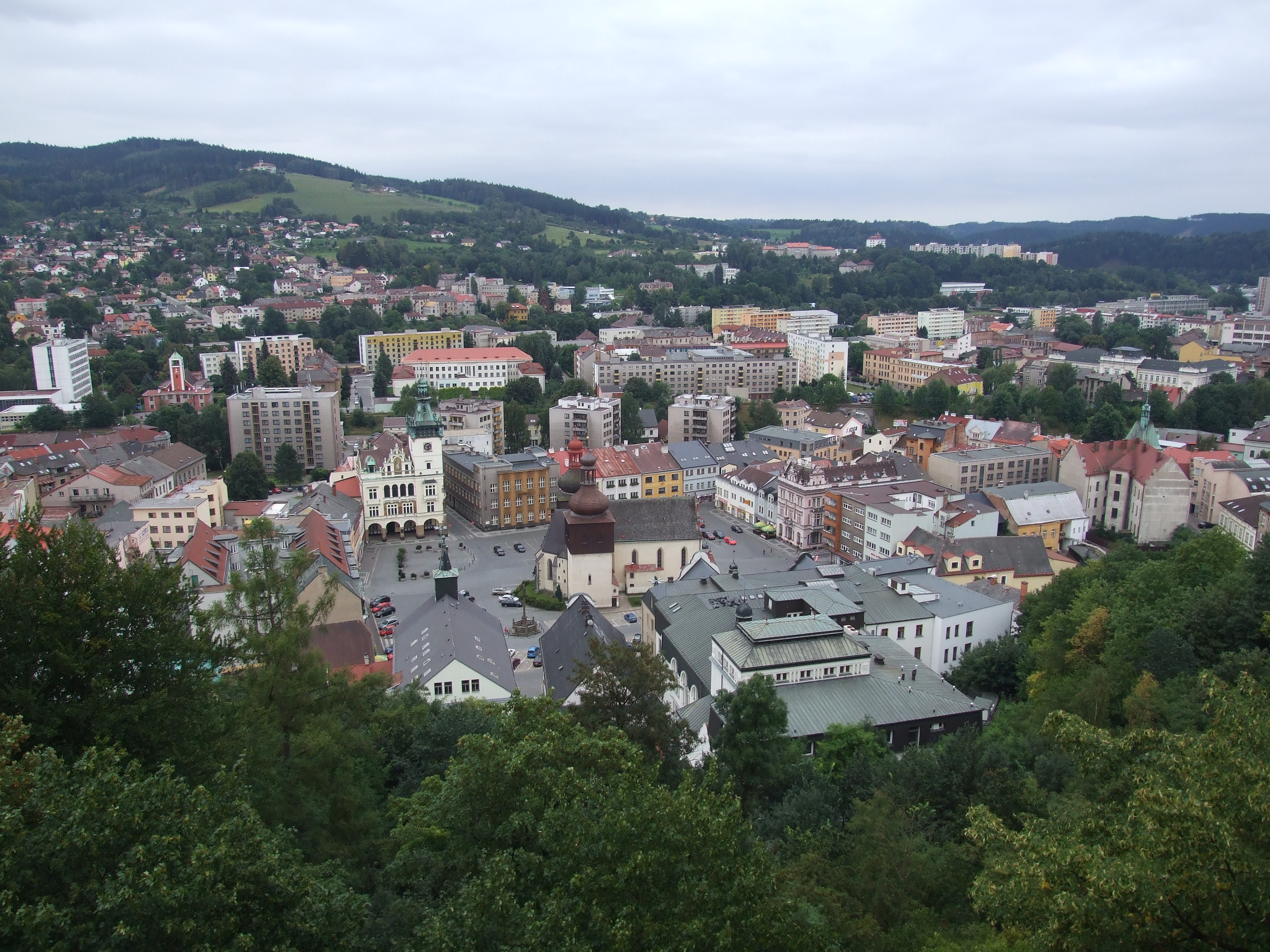 Náchod, výhled ze zámku směrem na Masarykovo náměstí.